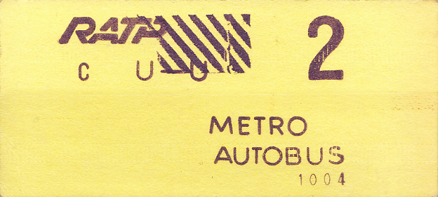 Ticket de métro U-U (années 70-80)